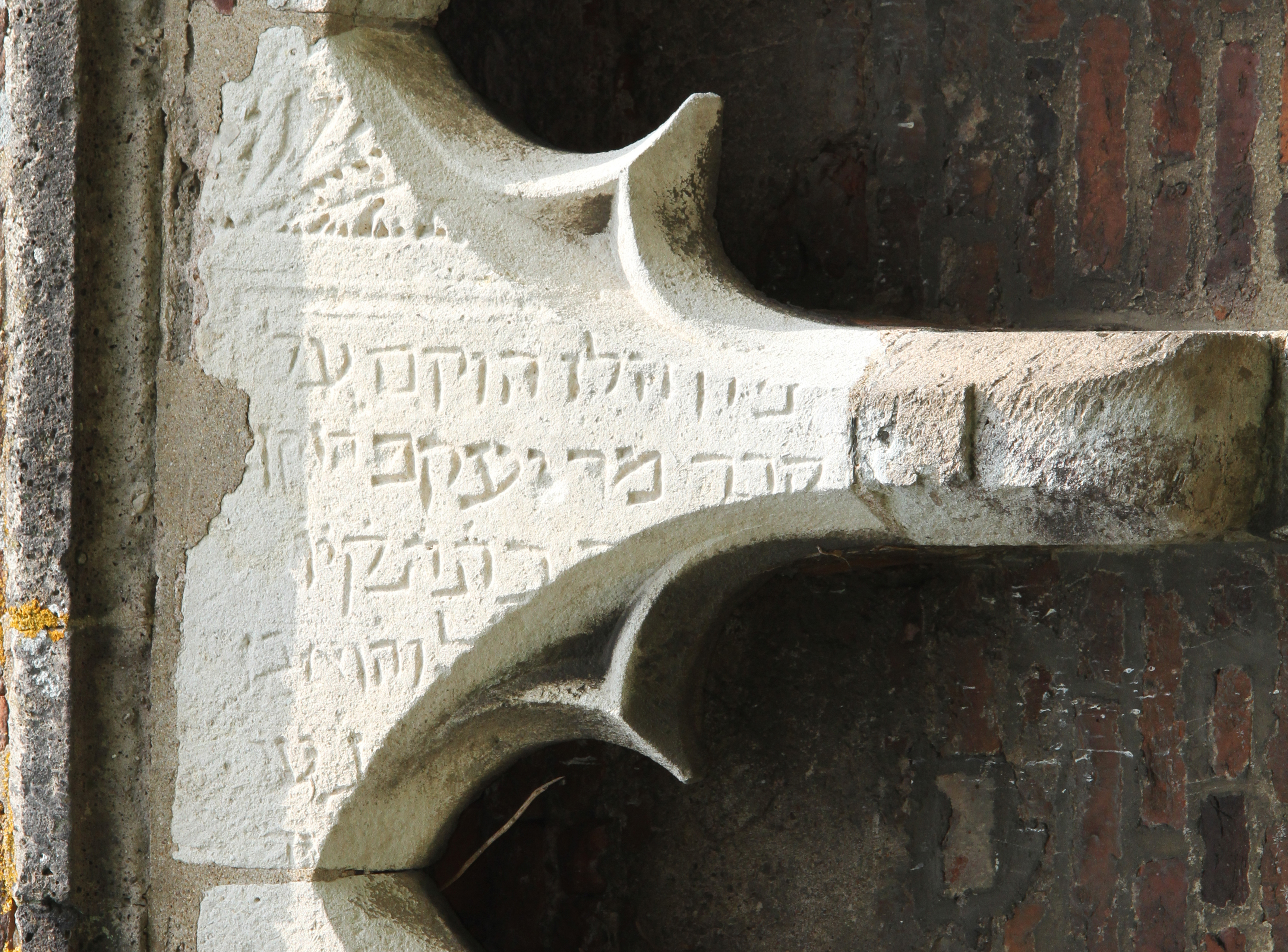 Grabstein des 1156 verstobenen Rabbiners Jacob aus Köln. Er befindet sich heute im Mauerwerk der Landesburg Lechenich